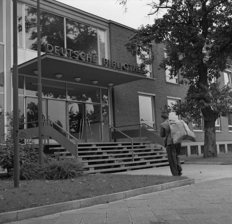 Deutsche Bibliothek Frankfurt/Main Information added by Wikimedia users.1959 in Frankfurt am Main errichteten Neubau der Deutschen Bibliothek an der Zeppelinallee.